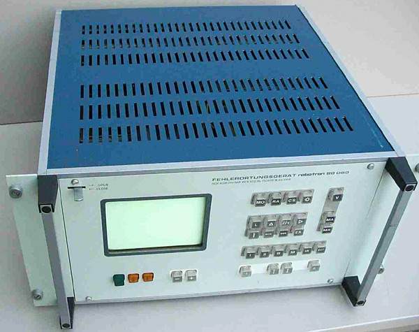 Das FOG 80050: Erstes Fehlerortungsgerät mit Mikrorechner